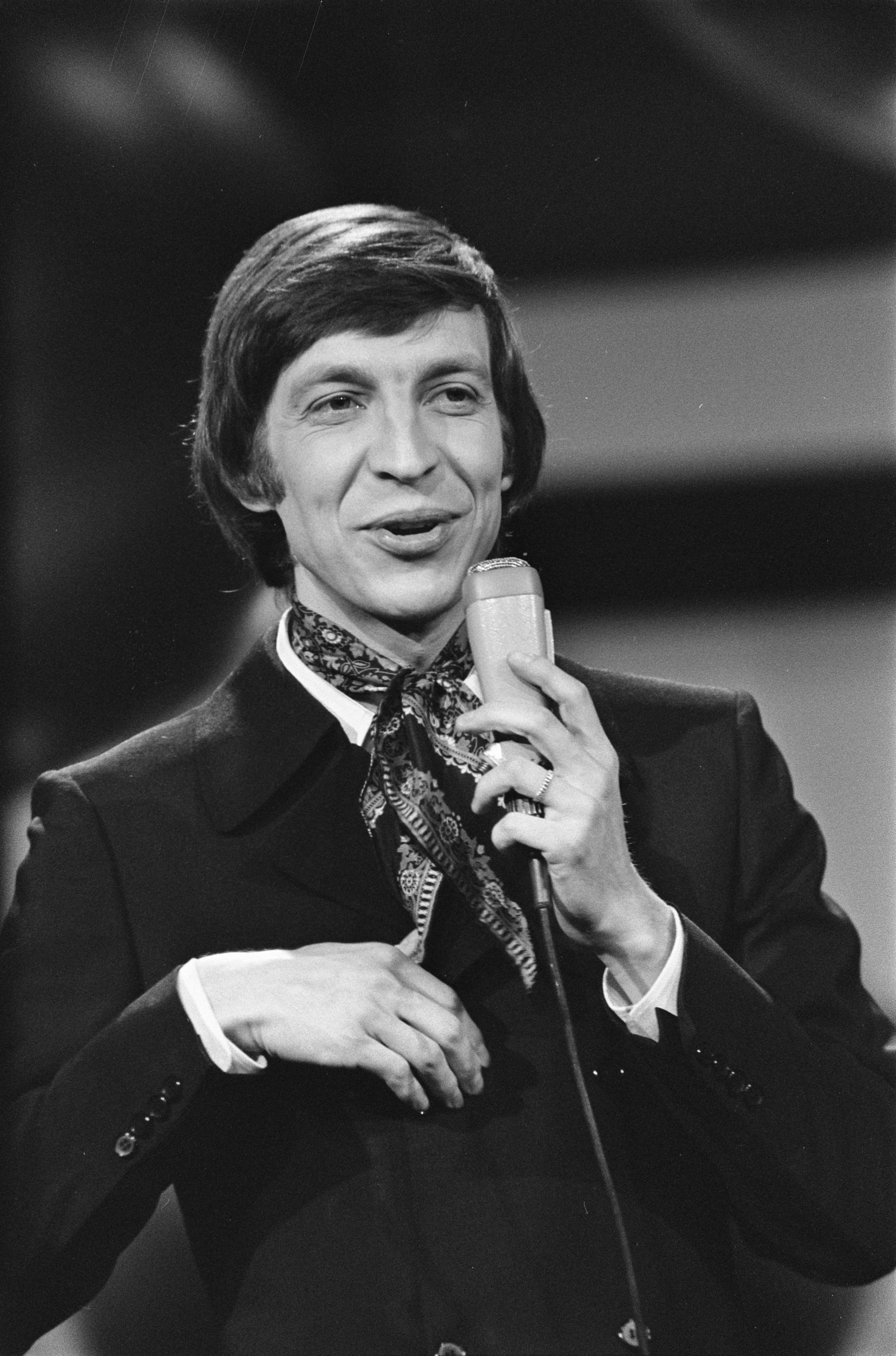 Collectie / Archief : Fotocollectie Anefo Reportage / Serie : Eurovisie Songfestival 1970 in RAI te Amsterdam Beschrijving : Henri Des (Zwitserland) Datum : 21 maart 1970 Locatie : Amsterdam, Zwitserland Trefwoorden : artiesten, songfestivals, zangers Instellingsnaam : Eurovisie Song Festival Fotograaf : Koch, Eric / Anefo Auteursrechthebbende : Nationaal Archief Materiaalsoort : Negatief (zwart/wit) Nummer archiefinventaris : bekijk toegang 2.24.01.05 Bestanddeelnummer : 923-3707